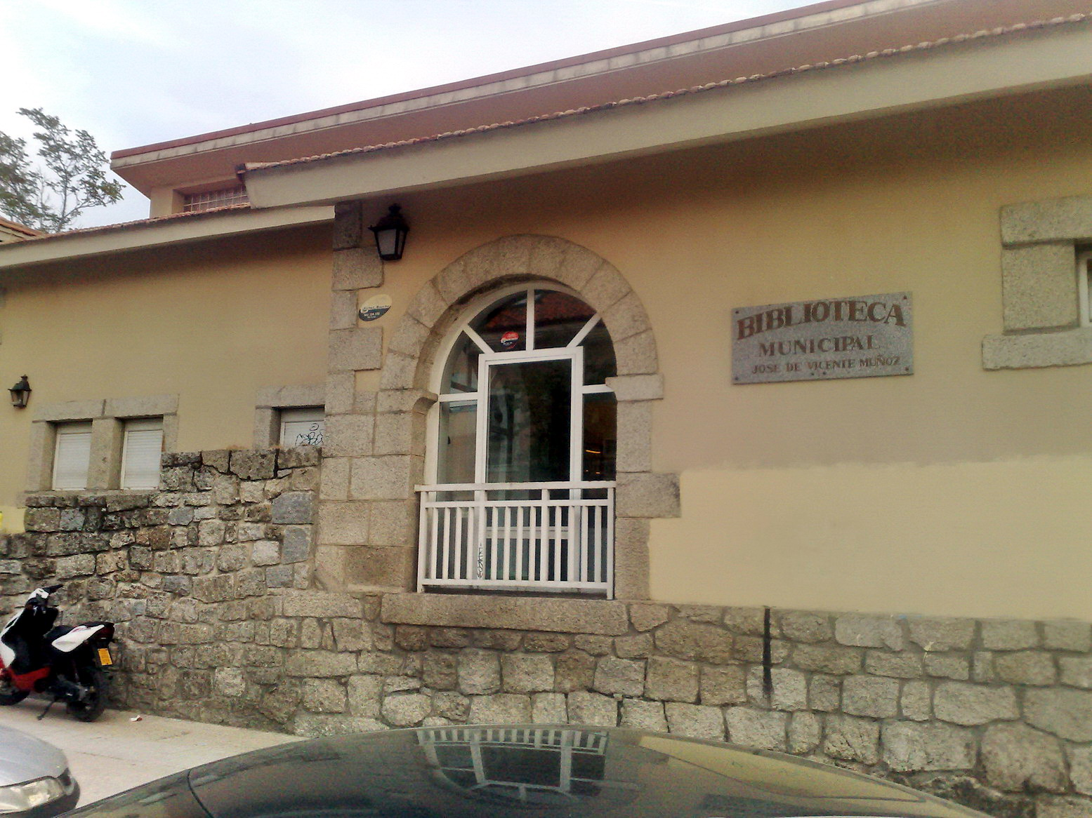 Torrelodones. Biblioteca del pueblo.